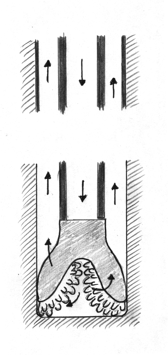 Erdöl-Bohrloch mit Bohrer, schematisch, Längsschnitt, Strömung der Bohrflüssigkeit längs der Pfeile, Bohrloch oben verrohrt